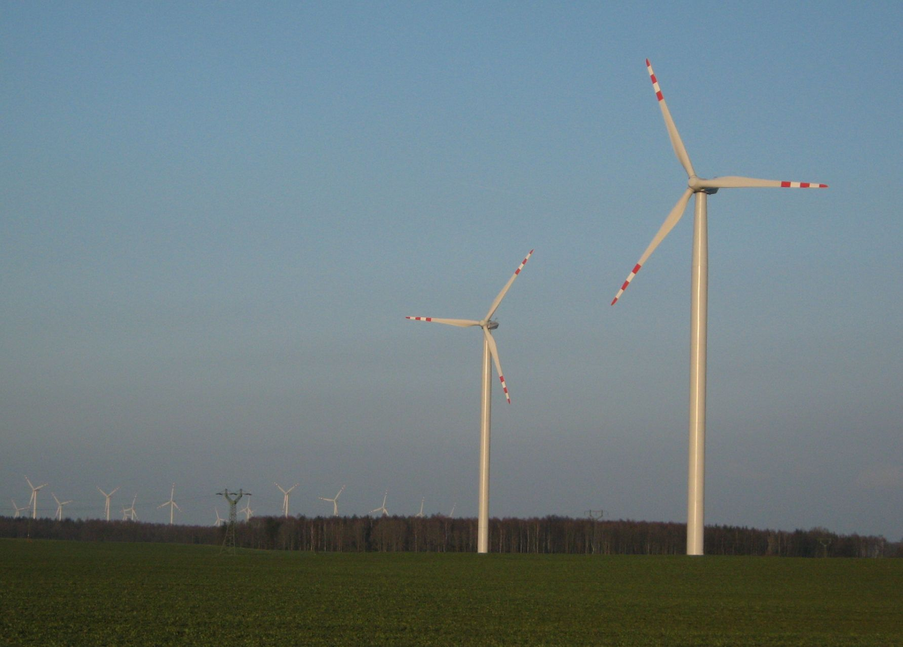 Farma wiatrowa Karścino, widok od strony Mołtowa (Lisiej Góry).